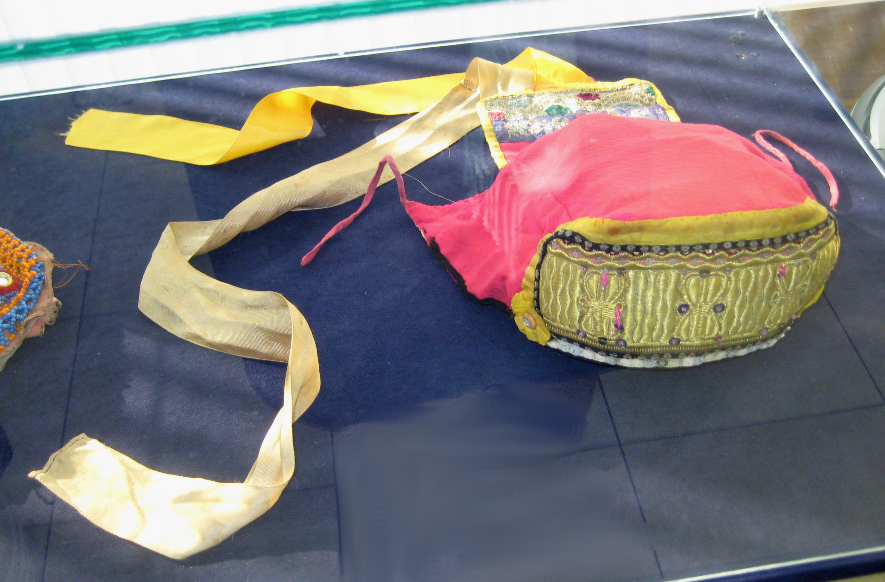 Сорока (Нижний Новгород) Село Криуша, Нижегородская область, 19 век. Представляет собой головной убор из плотной ткани, обтянутой красной хлопчатобумажной тканью. Чуть выпуклое донышко переходит в длинный позатыльник, его нижняя часть выложена синей и серебристой парчовой тканью с цветочным орнаментом, обшита жёлтым ситцем по краям. Жёлтые атласные ленты идут от позатыльника по спине. Очелье из золотного галуна, украшено пайетками, по бокам - ситцевые розетки с ручными пуговицами. О происхождении термина "сорока" ведутся споры: вернее всего предположение о его связи с птицей, так как "птичьи" названия нередки в области русских головных уборов - кокошник от "кокошь" (курица, петух), кичка от "кика" (утка) и другие.